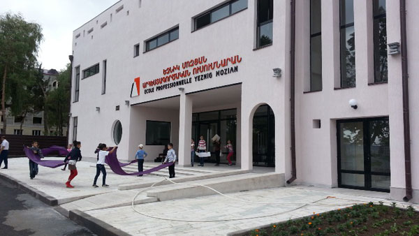 Եզնիկ Մոզյանի անվան արհեստագործական ուսումնարանը Շուշիում